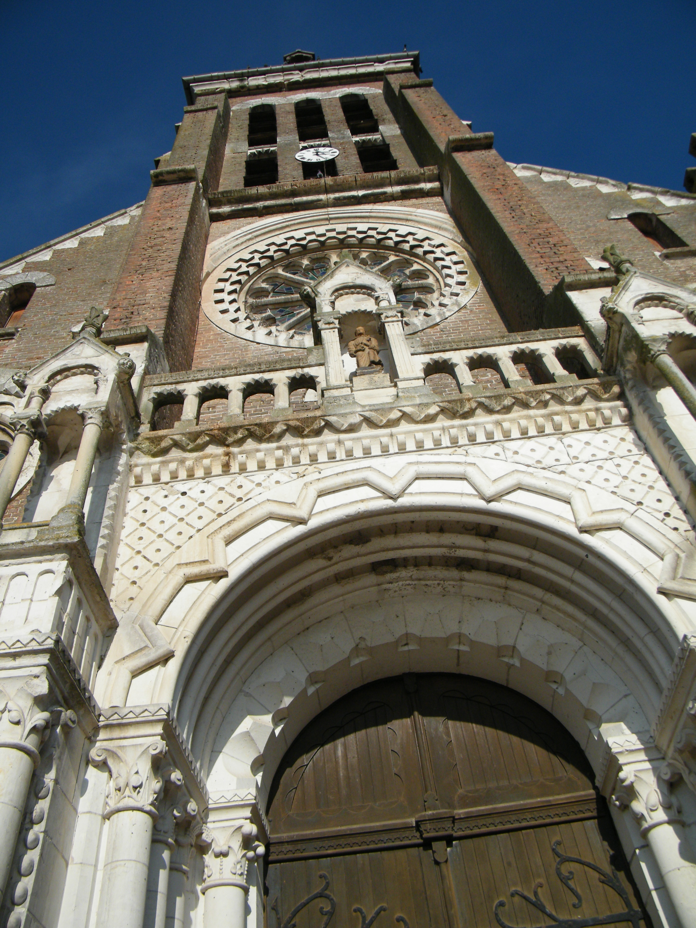 Pont-Rémy, Somme, Fr, église (2)